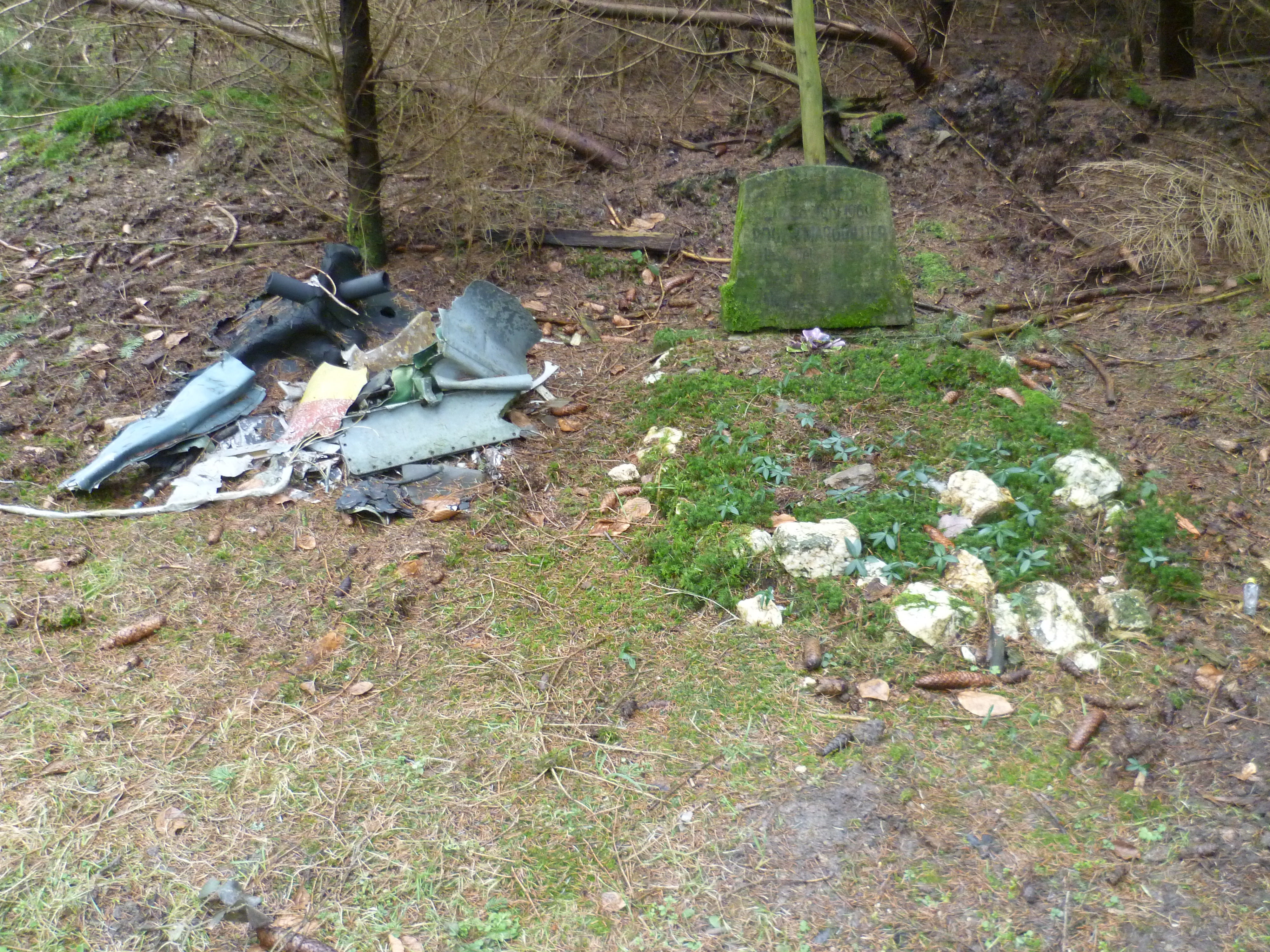 Gedenkstein für den Flugzeugabsturz Laufenselden 1969